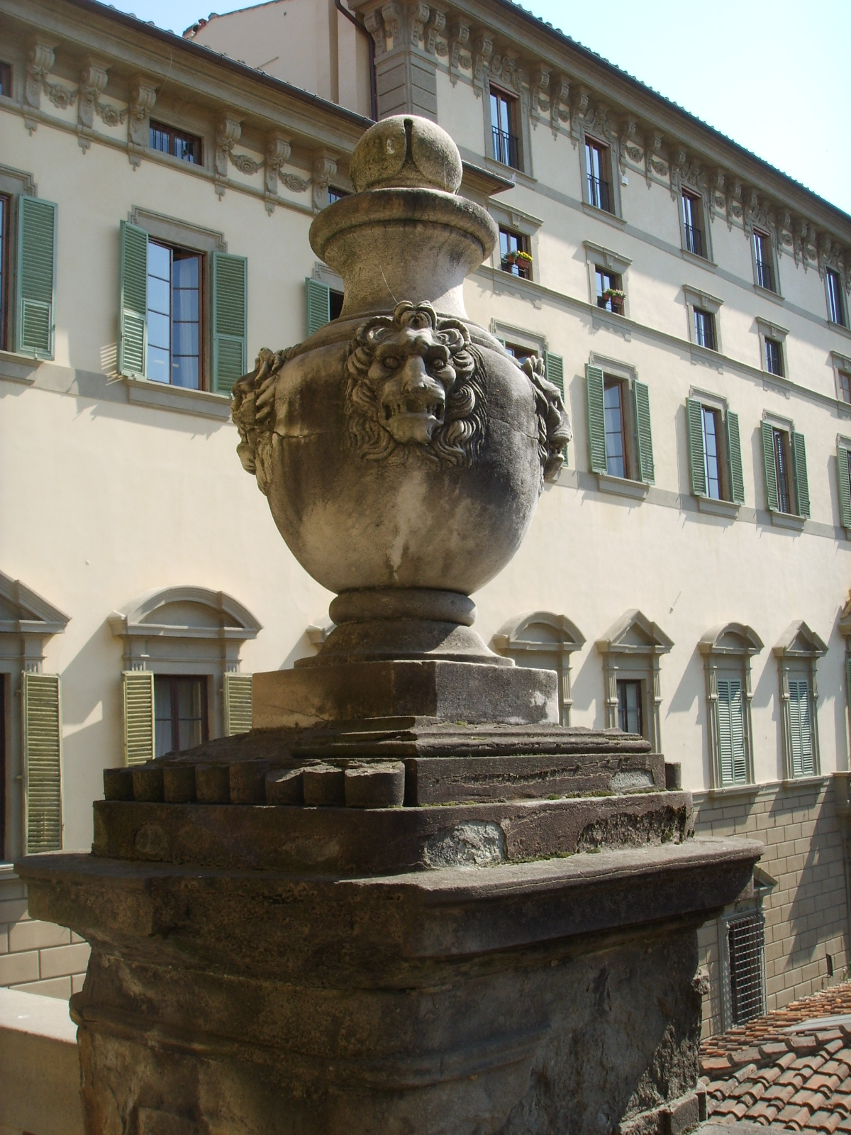 Palazzo_di_San_Clemente,_ terrace in Florence